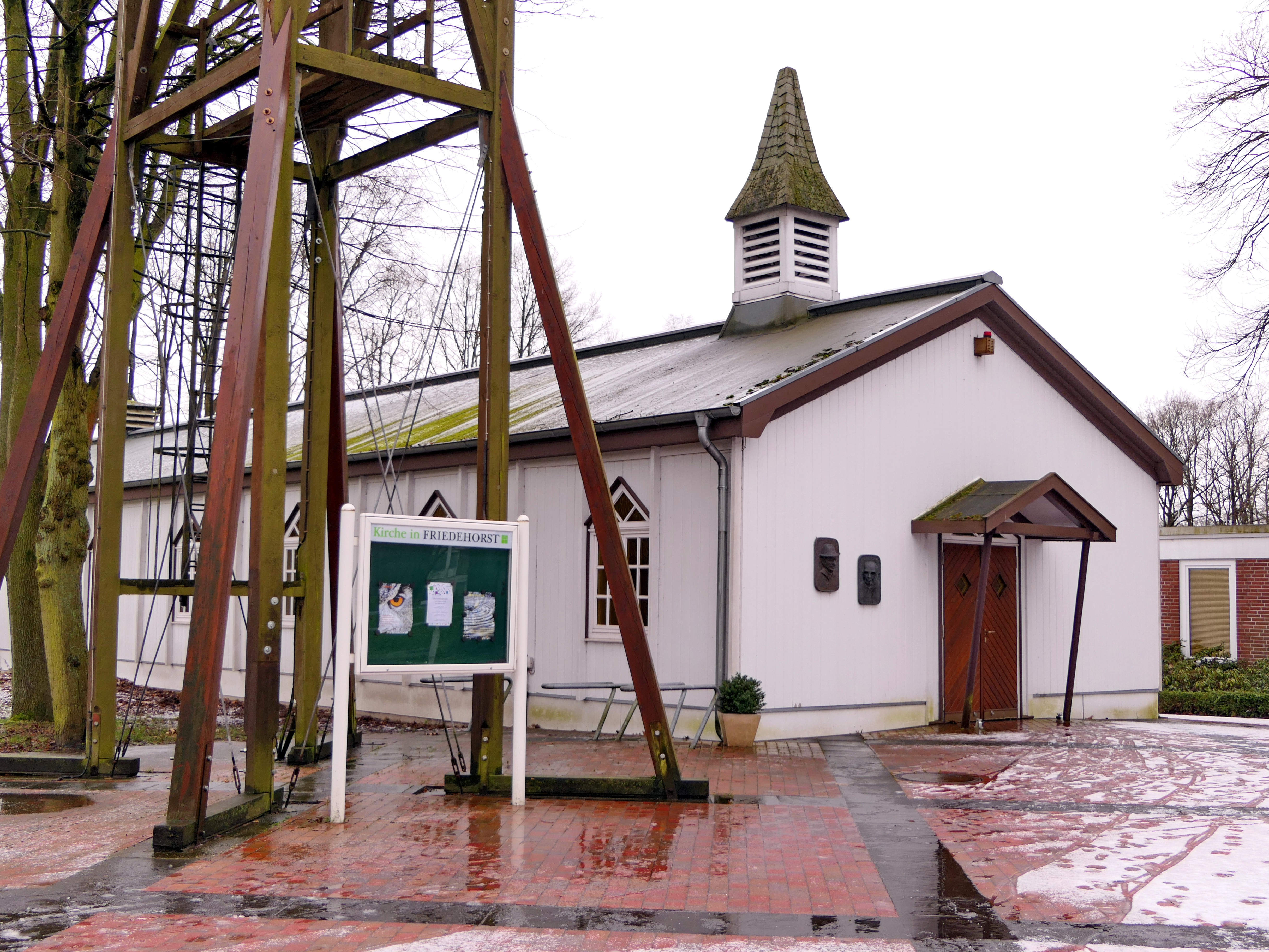 Kirche auf dem Gelände der Stiftung Friedehorst